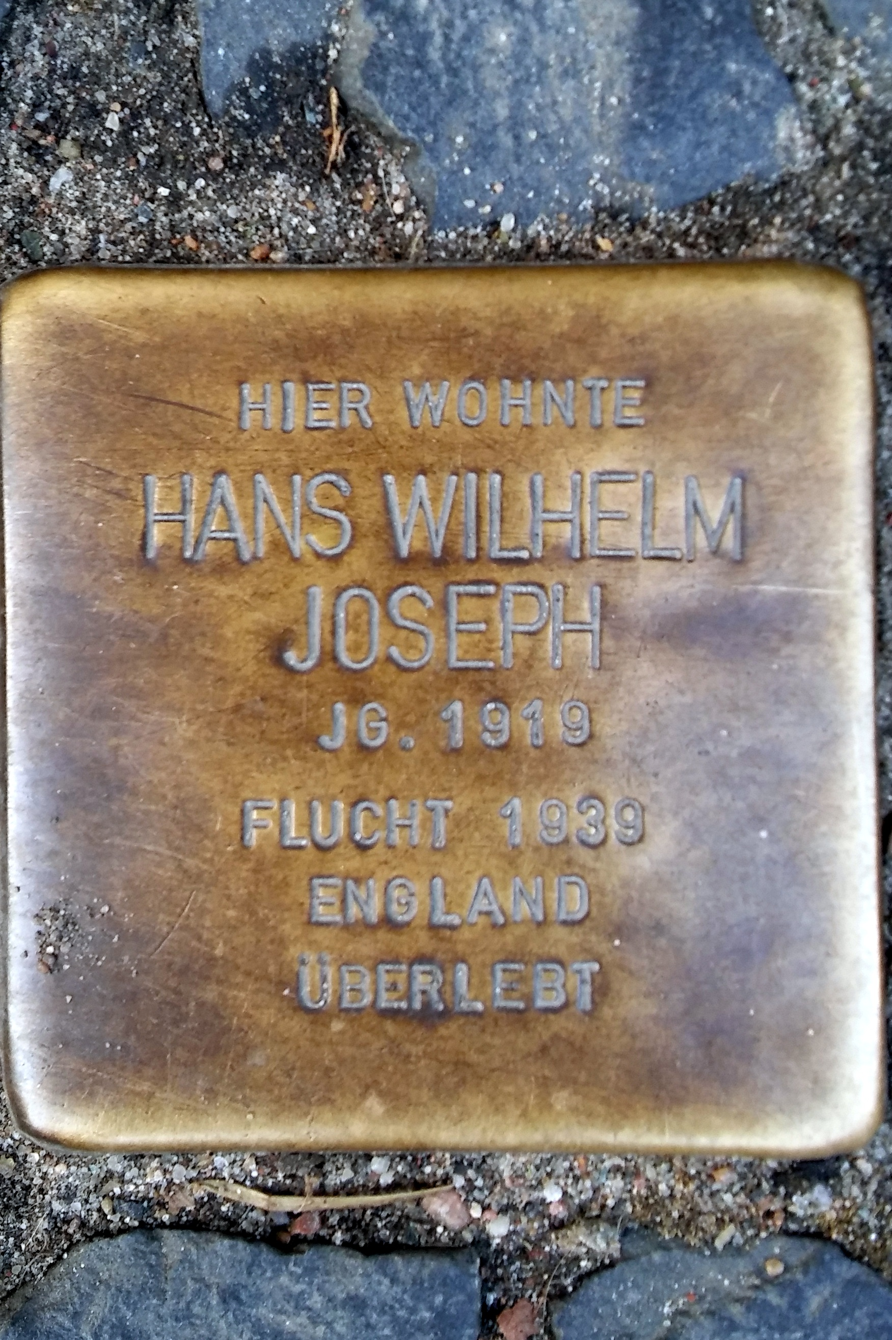 Stralsund, Langenstraße 69, Stolperstein Hans Wilhelm Joseph